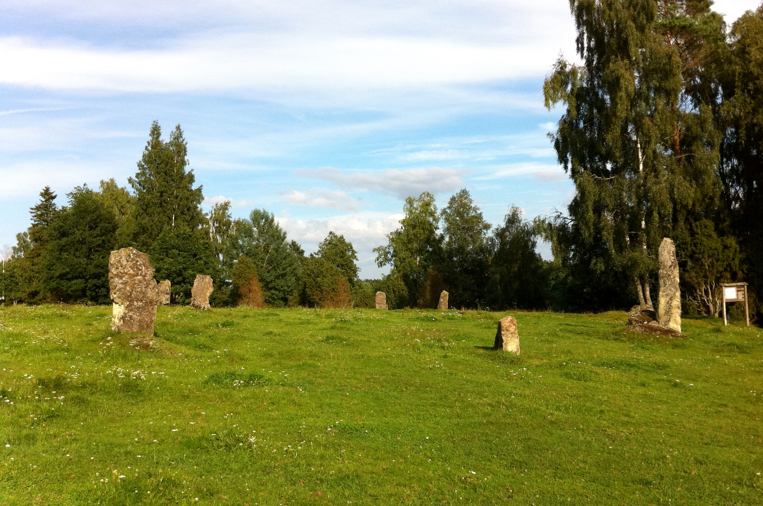 Västragarden gravfält